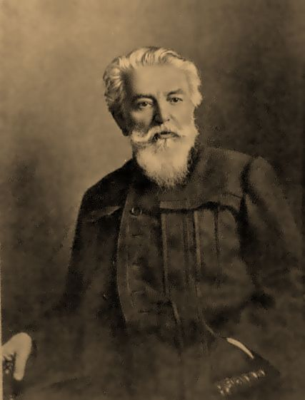 Александр Карлович Беггров. Фотография.